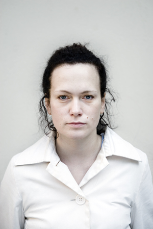 Magda Bielesz, fot. Kuba Dąbrowski.